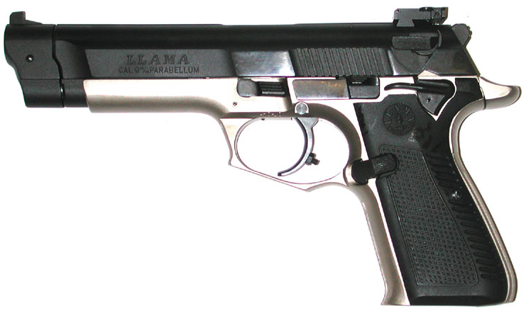 Auteur gnafron , scan livre Spanish handguns auteur Gangarosa